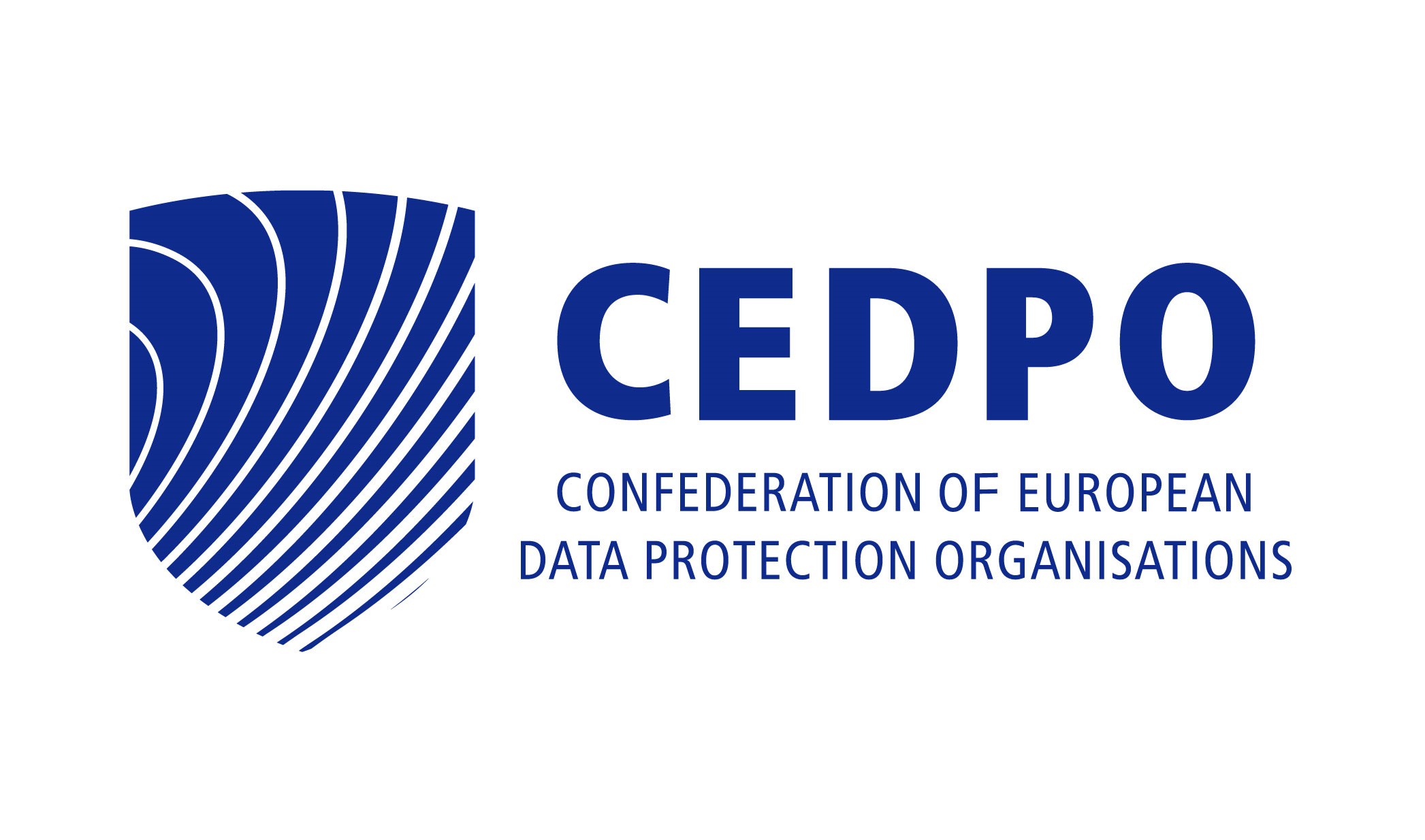 Logo der Confederation of European Data Protection Organisations (CEDPO)